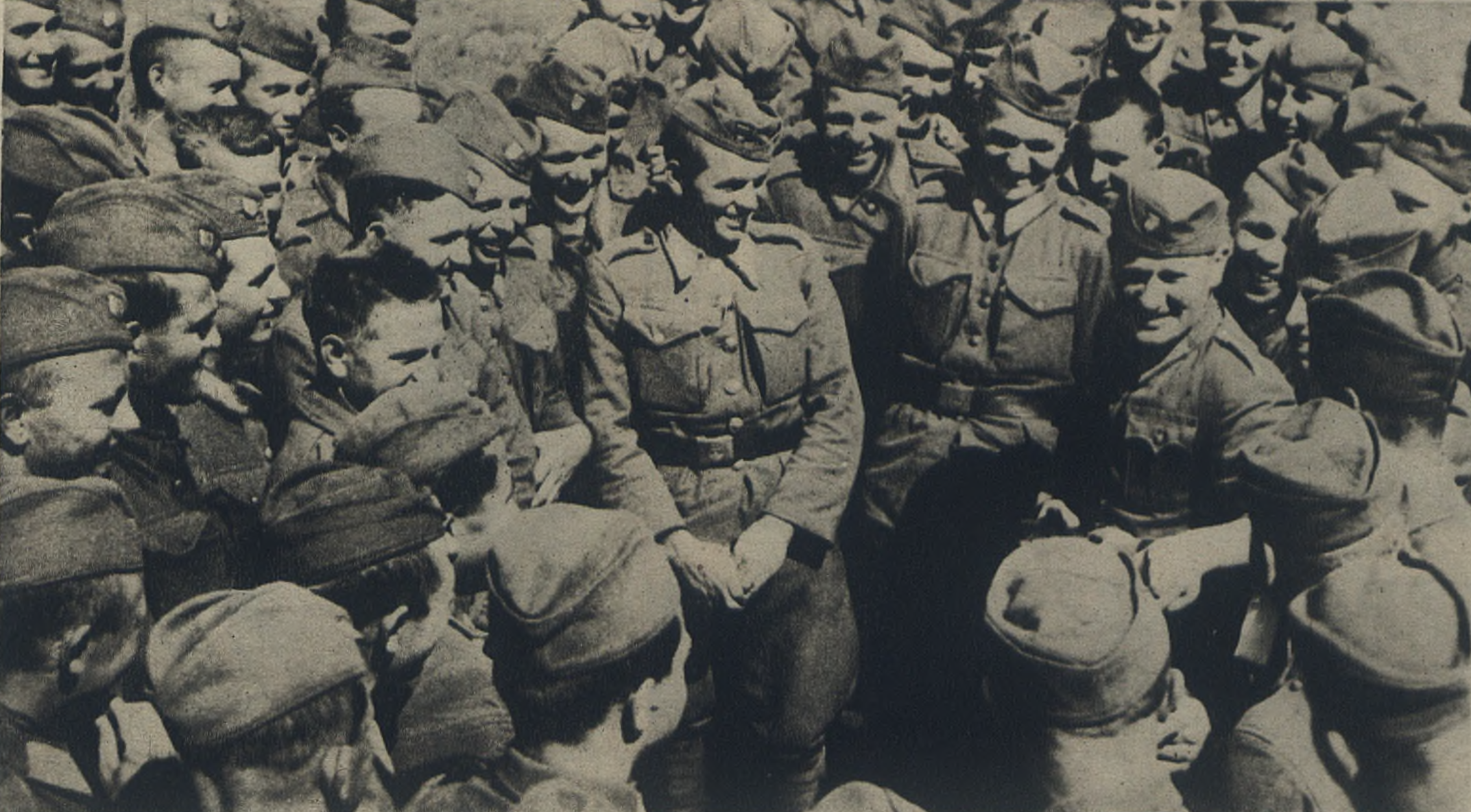 "Slovenských frontových bojovníkov vidíme vo chvíľke bojovej prestávky pri srdečnej debate s veliteľom."